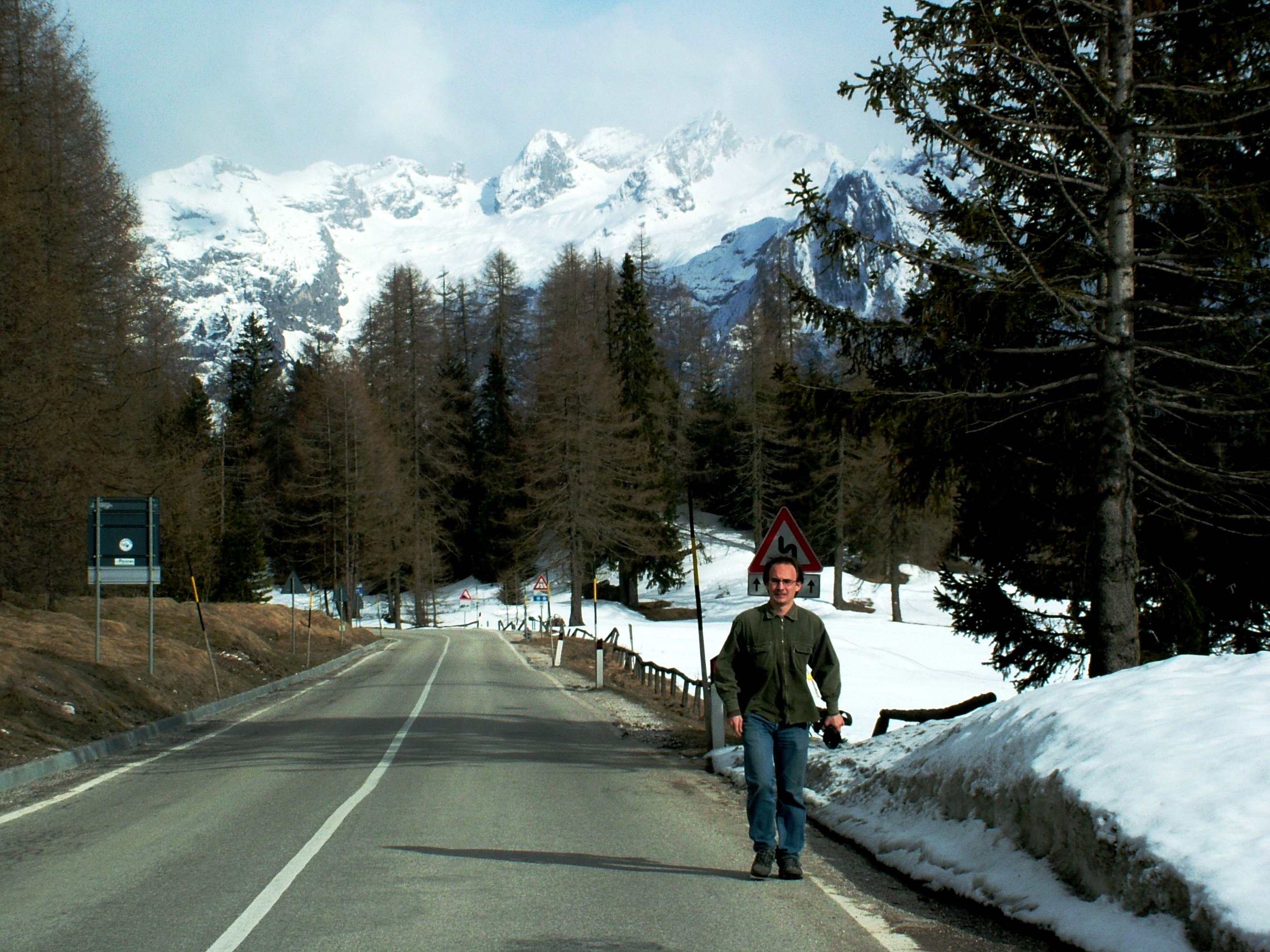 Tre Croci-hágó (Passo Tre Croci), Dolomitok, Olaszország